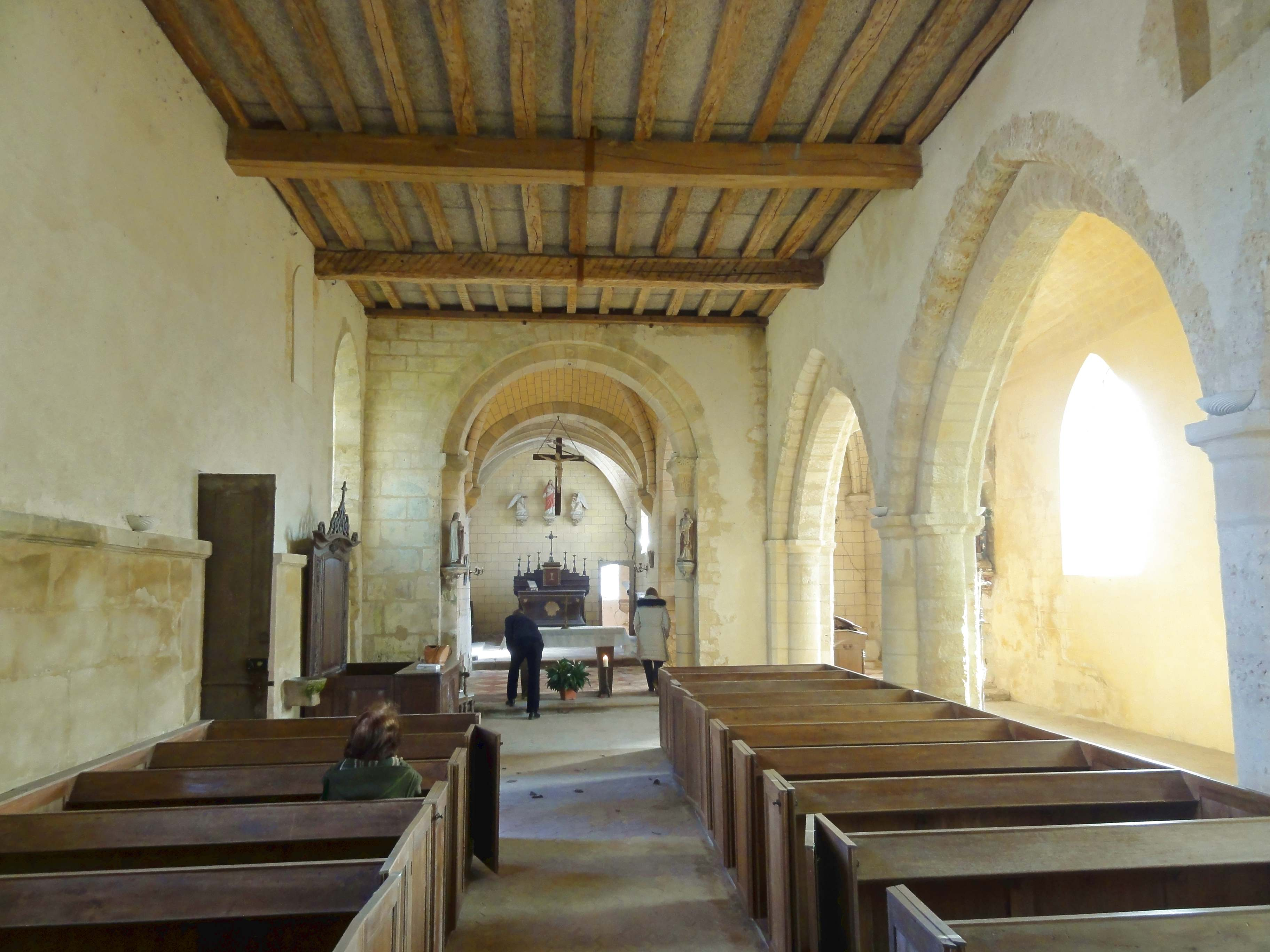 Intérieur de l'église - voir titre.